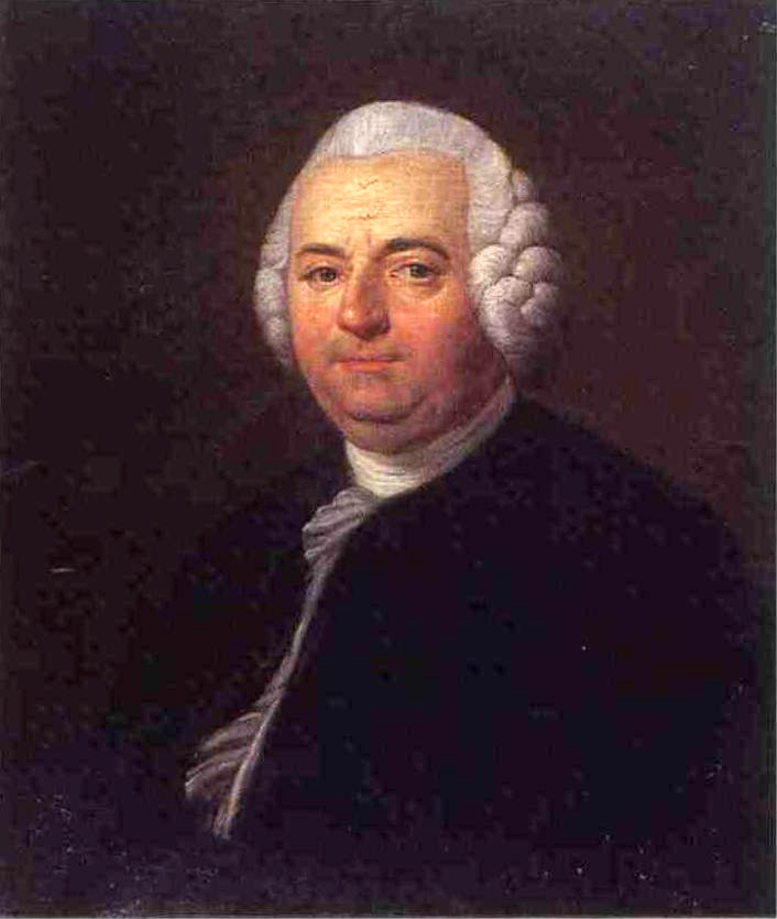 French chemist Hilaire Rouelle (1718–1779)